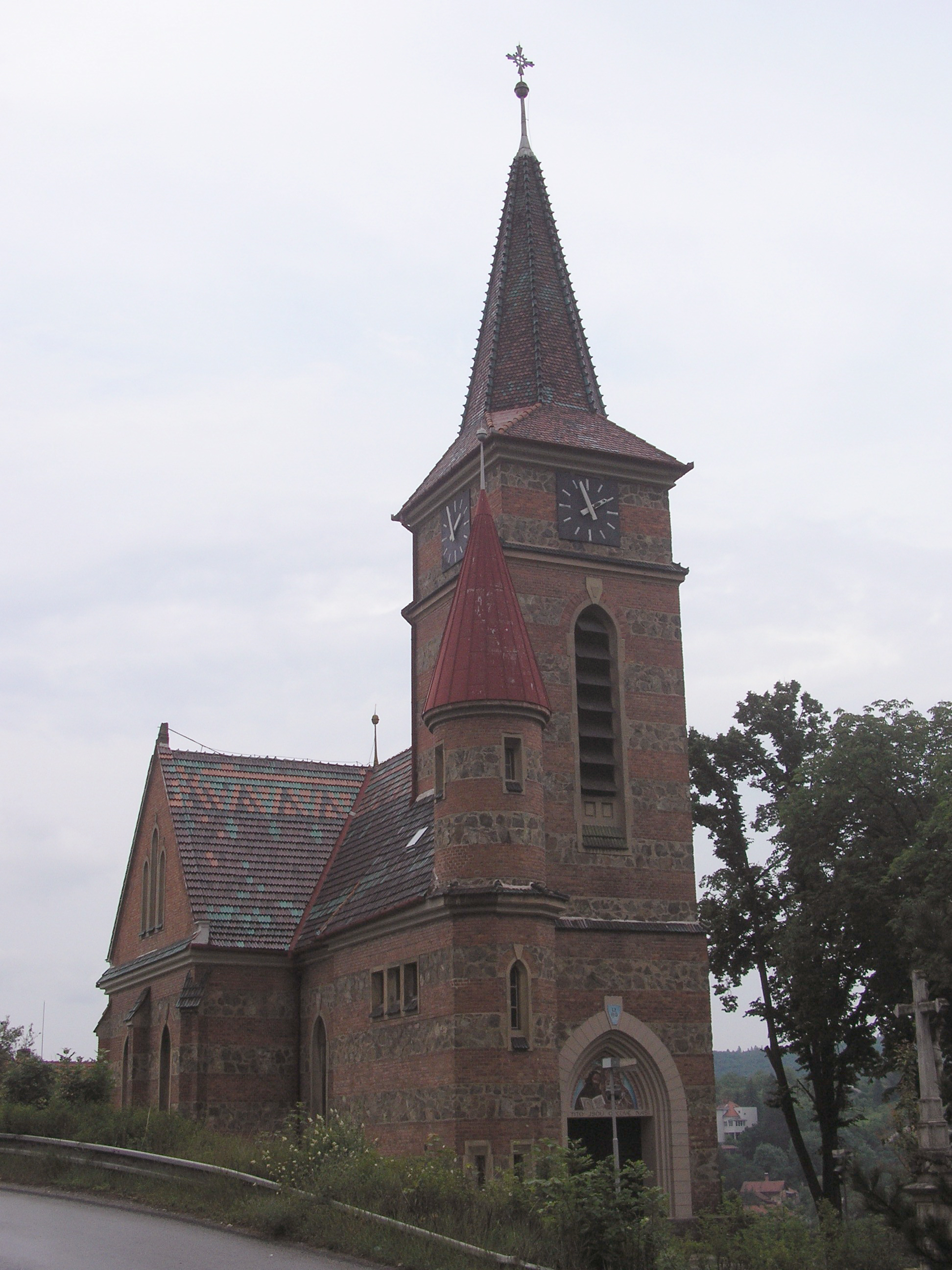 Kostel sv. Cyrila a Metoděje v Bílovicích nad Svitavou